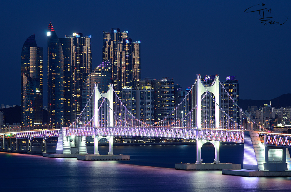 釜山の夜景です。